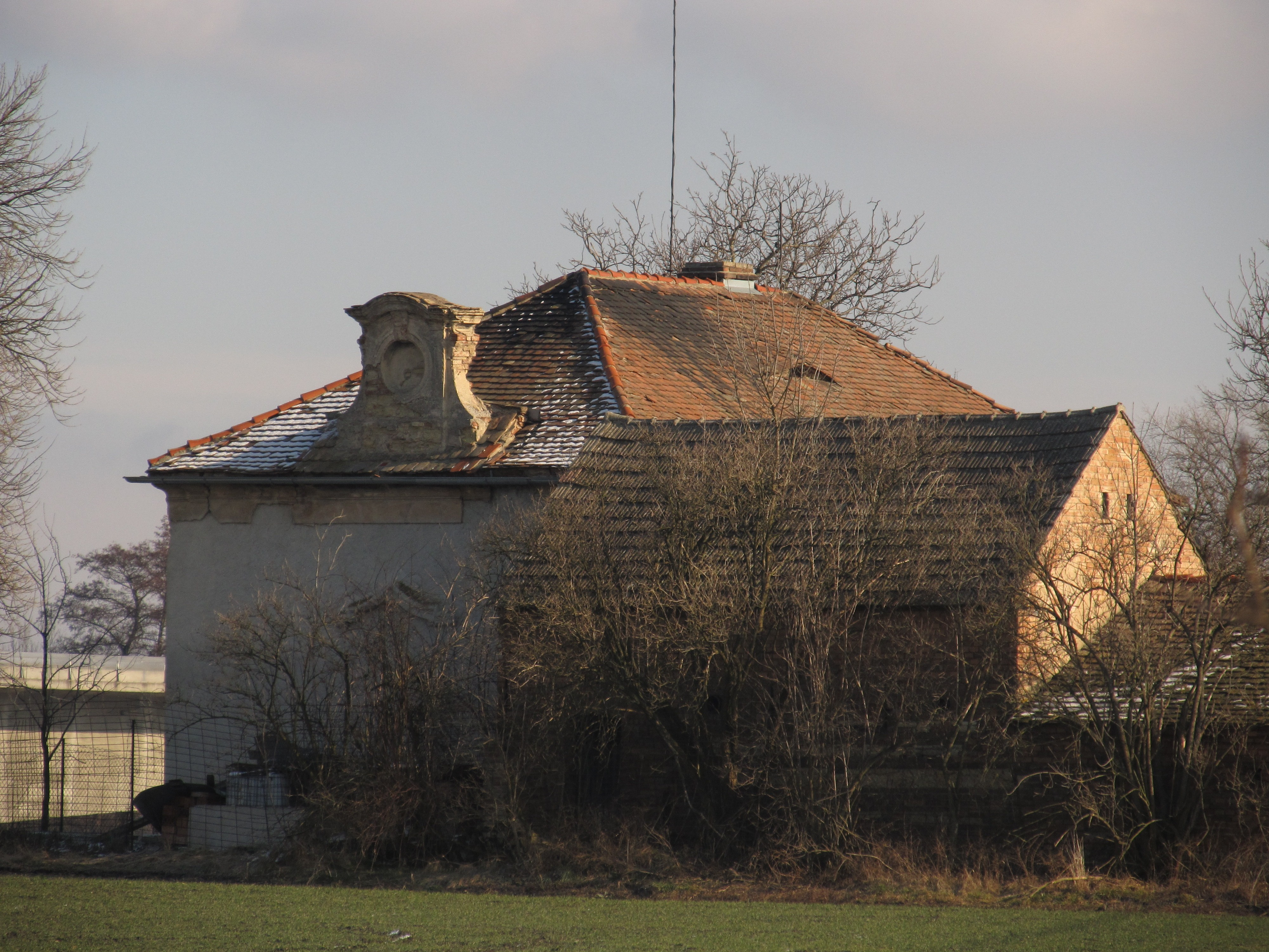 Kostel sv. Klimenta - bývalý (Hostěnice), Hostěnice 46